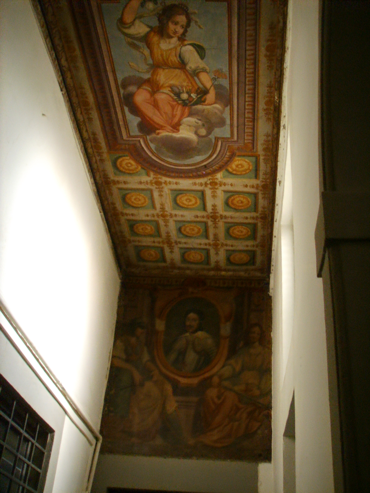 Palazzo tolomei (Florence), interno